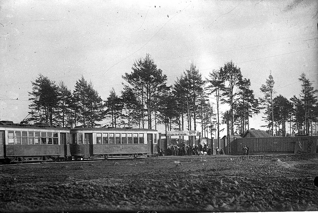 Конечная станция трамвая в районе нынешнего (2017 год) Южного автовокзала на улице Щорса (на момент съемки — 4-й Загородной)